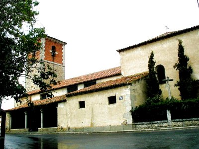 Parroquia de La Serrada